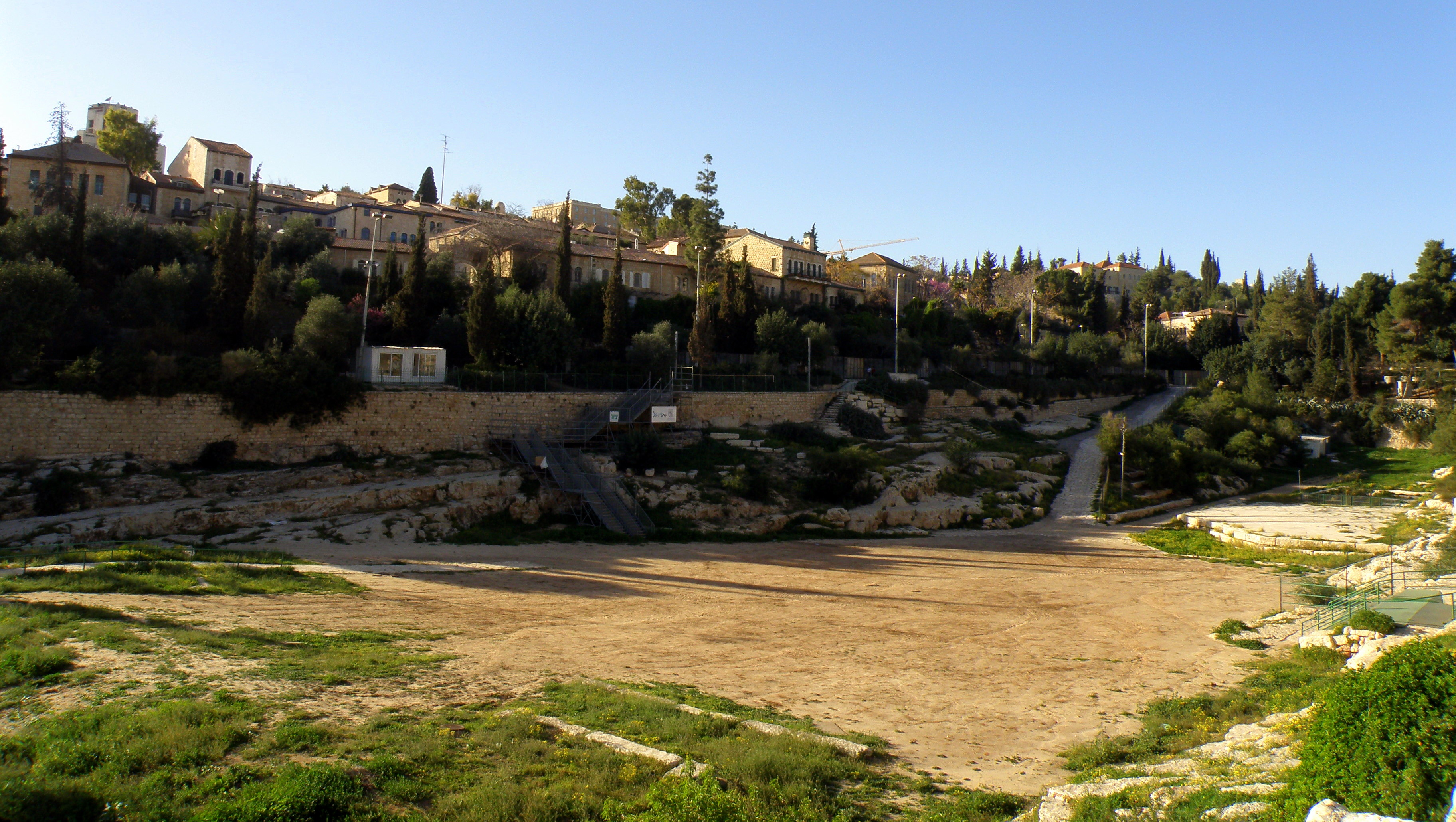 בריכת הסולטן | Sultan's Pool Jerusalem